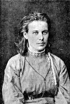 Elizaveta Fedorovna Ermolaeva (1851-?)